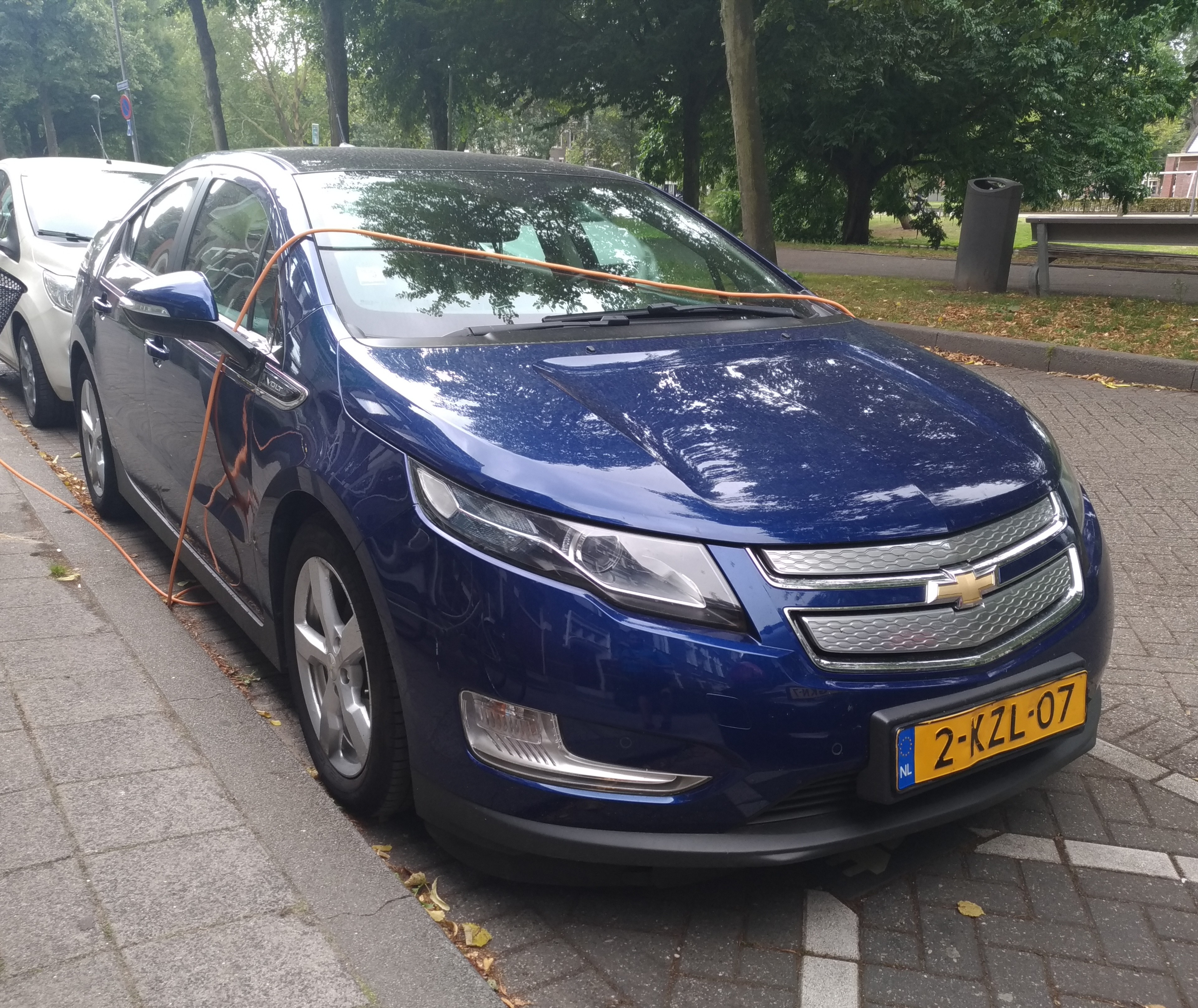 2013 Chevrolet Volt (149 hp) at Rotterdam